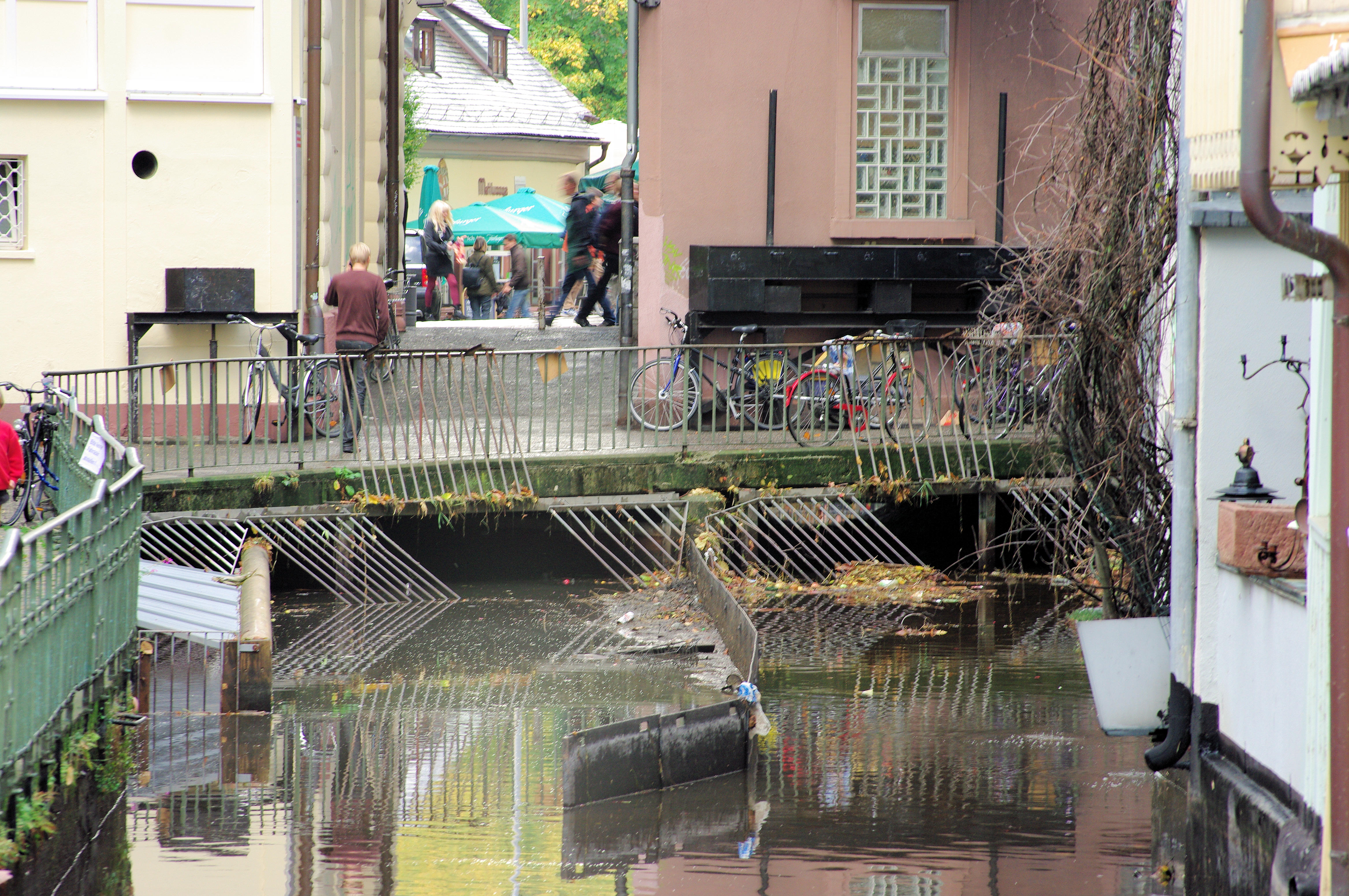 Der Ewige Teiler in der Fischerau Bachabschlag 2009